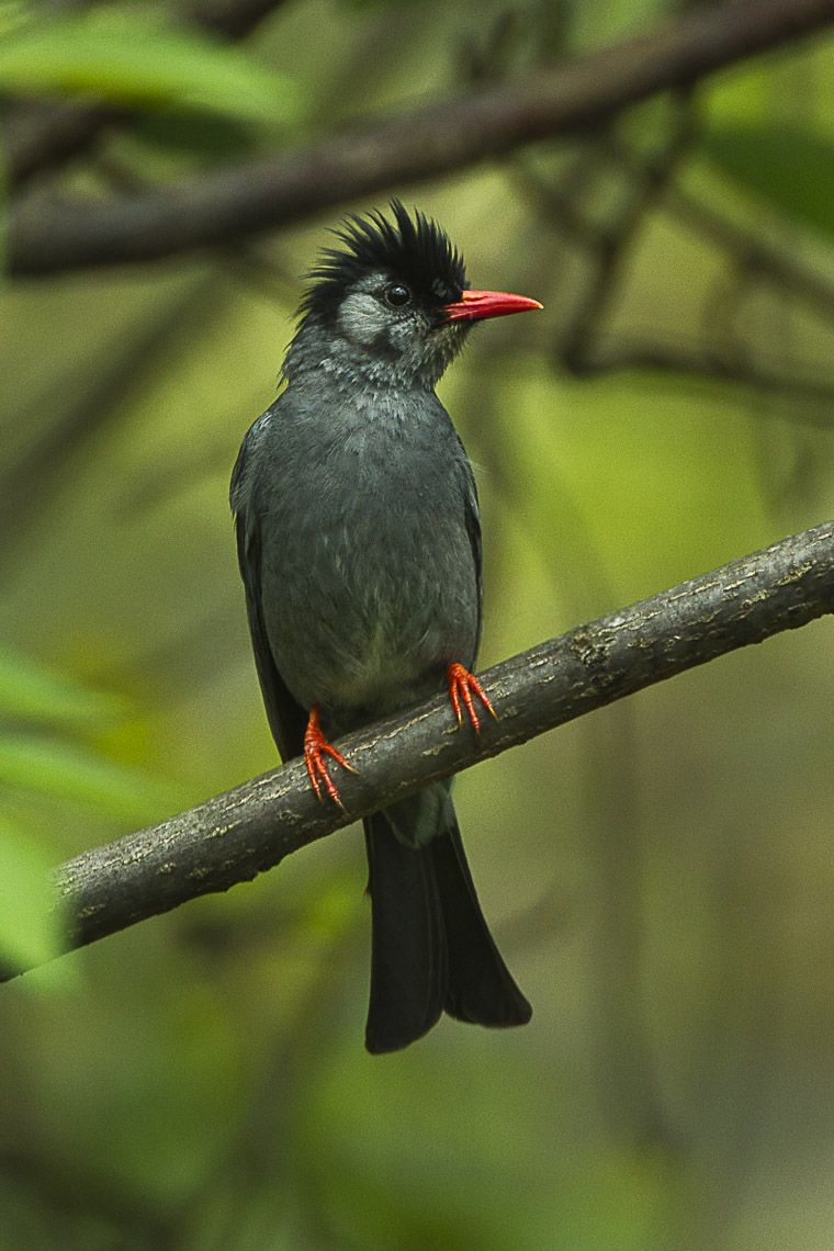 Black Bulbul - Bhutan_S4E0464